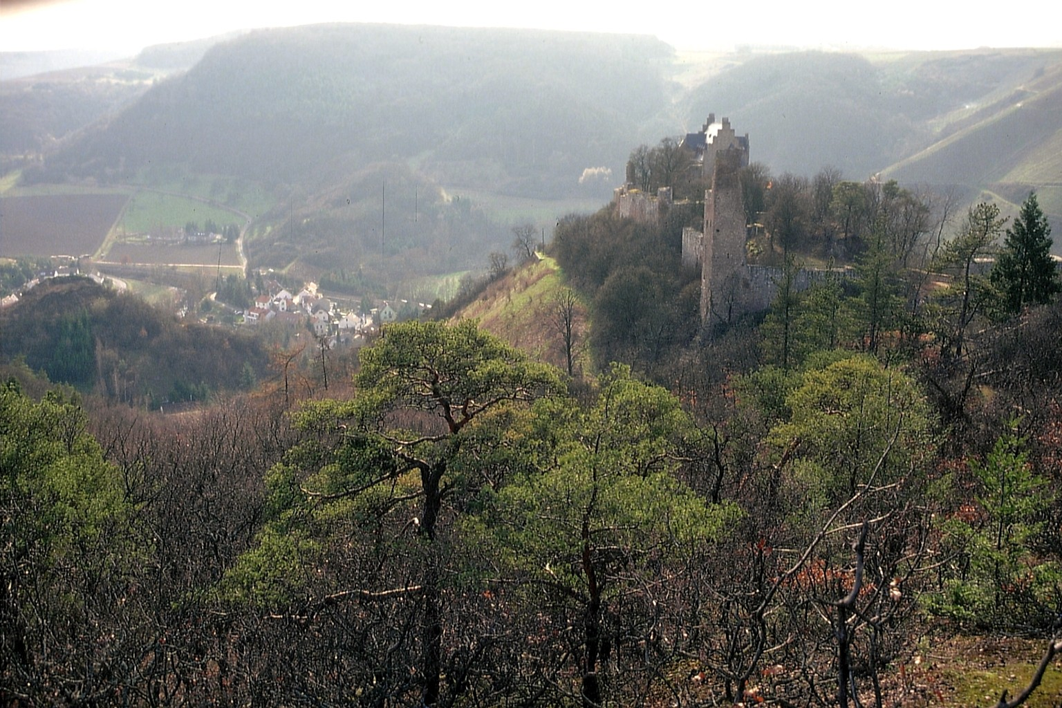 Altenbaumburg und Burgruine Treuenfels (links) mit Talblick auf den Ort Altenbamberg. Die Altenbaumburg ist die Ruine einer Spornburg auf einem Bergrücken über dem Ort Altenbamberg im rheinland-pfälzischen Alsenztal. Sie ist die Stammburg der Raugrafen und eine der größten Burgruinen der Pfalz. Die ursprünglich auf einer strategisch günstigen Position des Alsenztals stehende Anlage verlor ihre Bedeutung, nachdem ihre Besitzer, die Raugrafen, im 14. Jahrhundert ausstarben. Von der Burgruine Treuenfels haben sich nur Spuren erhalten. Die heute nahezu komplett überwucherten kleinen Ruinenreste der ehemaligen Burganlage werden oft fälschlicherweise als Vorwerk der Altenbaumburg bezeichnet. Hauptsächlich haben sich noch die bis zu acht Meter hohe Reste der Ringmauer aus Bruchsteinmauerwerk erhalten.